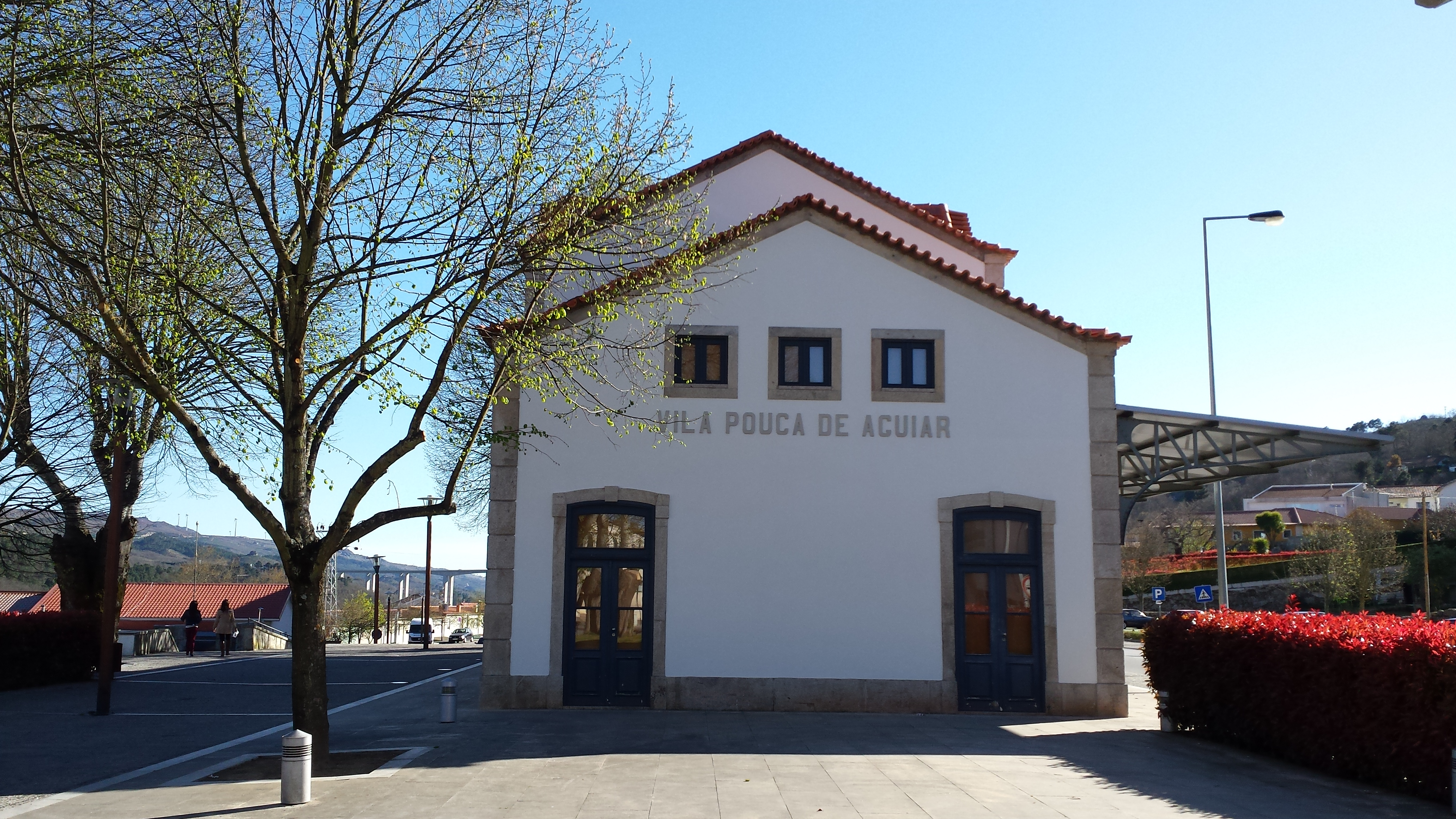 5450 Vila Pouca de Aguiar, Portugal